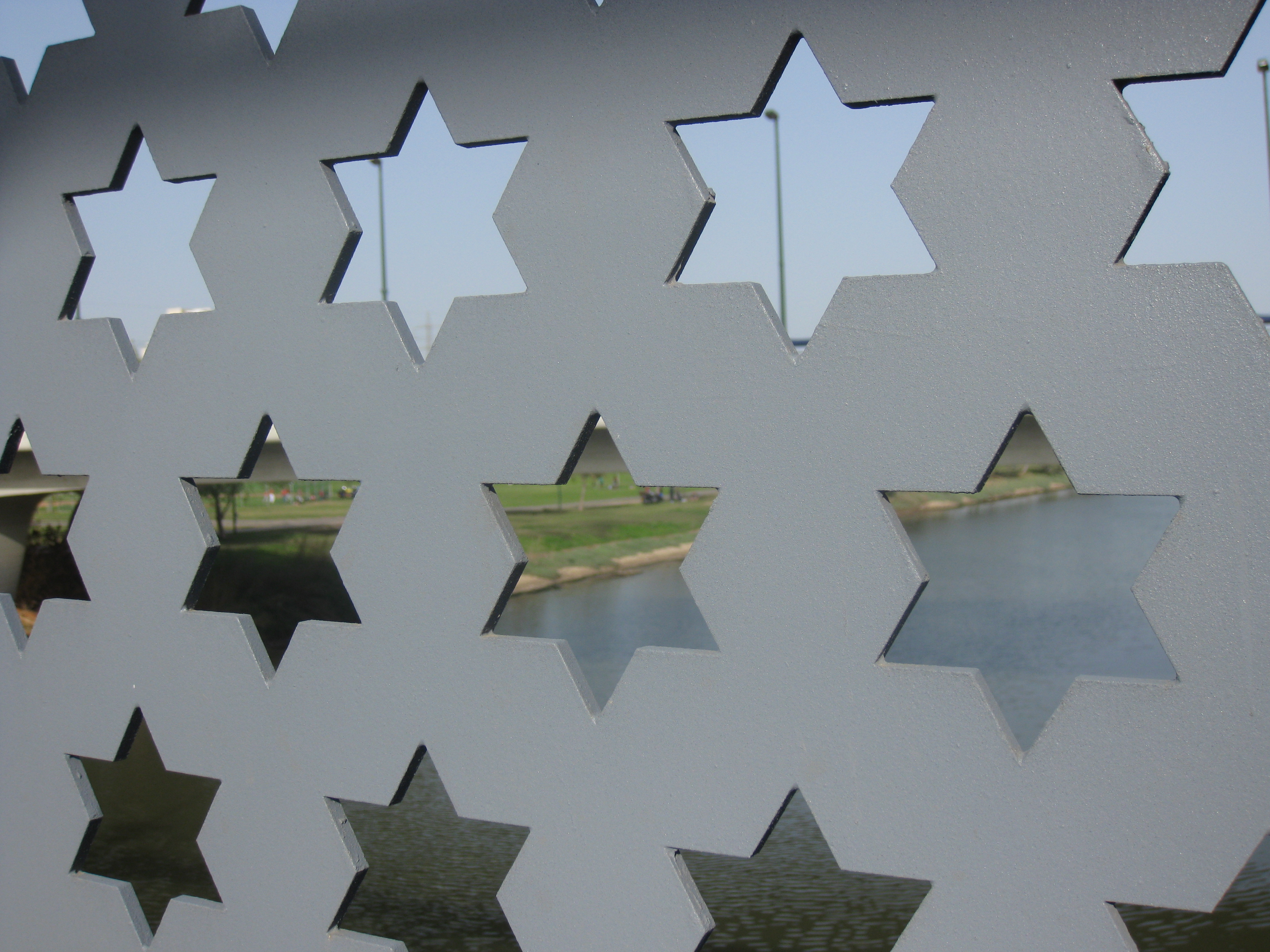 The Yarkon Park פארק הירקון גשר אוסישקין